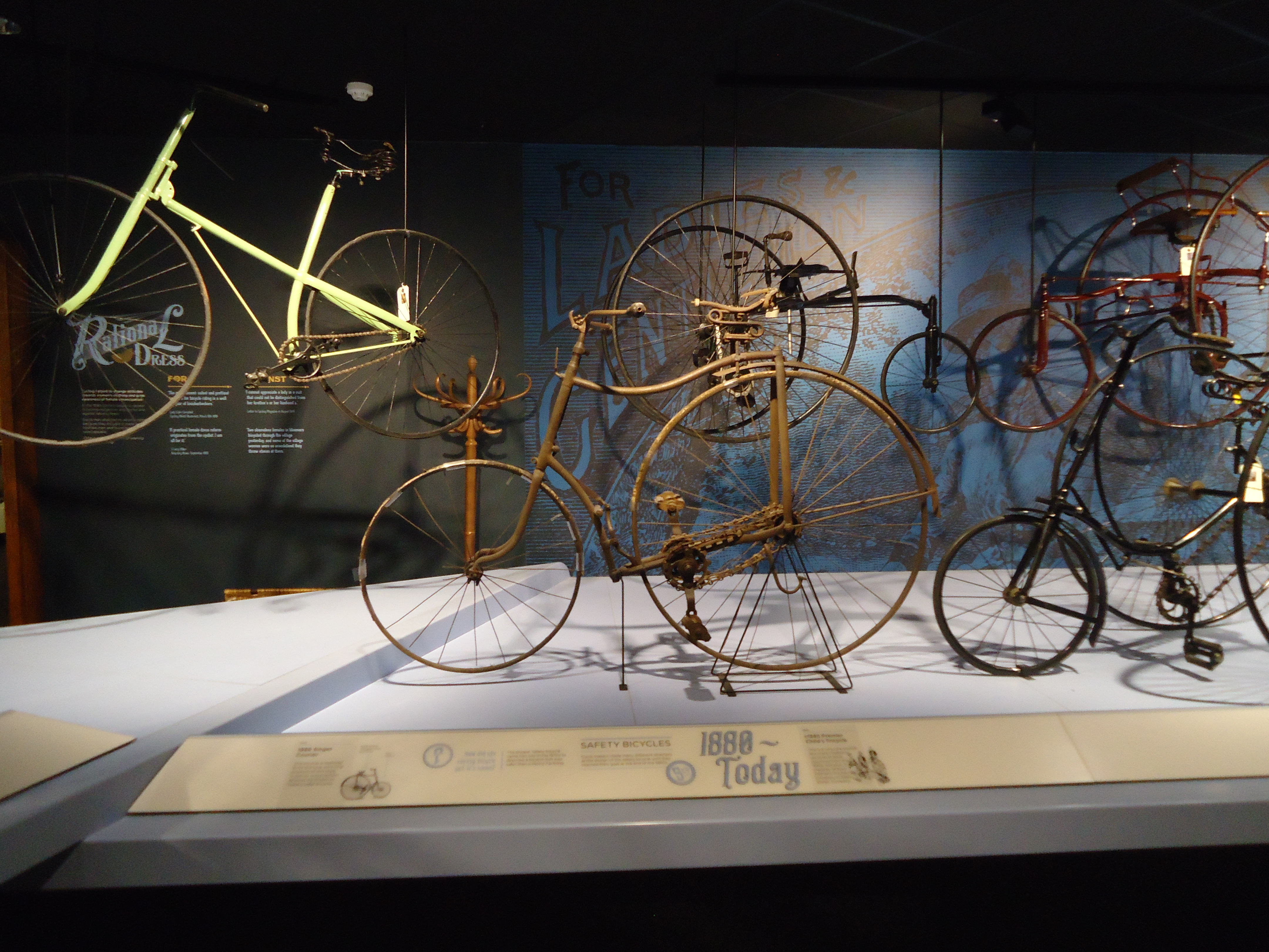 Museo del Transporte de Coventry